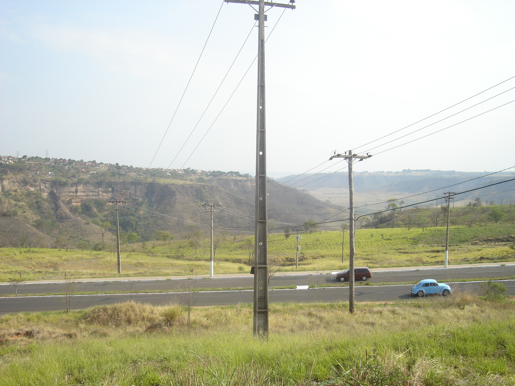 Valley, Marília, São Paulo, Brazil - Vale em Marília, São Paulo, Brasil